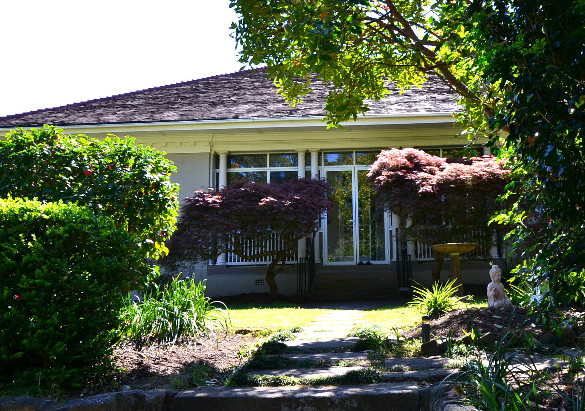 Macquarie Cottage, Pymble, Sydney